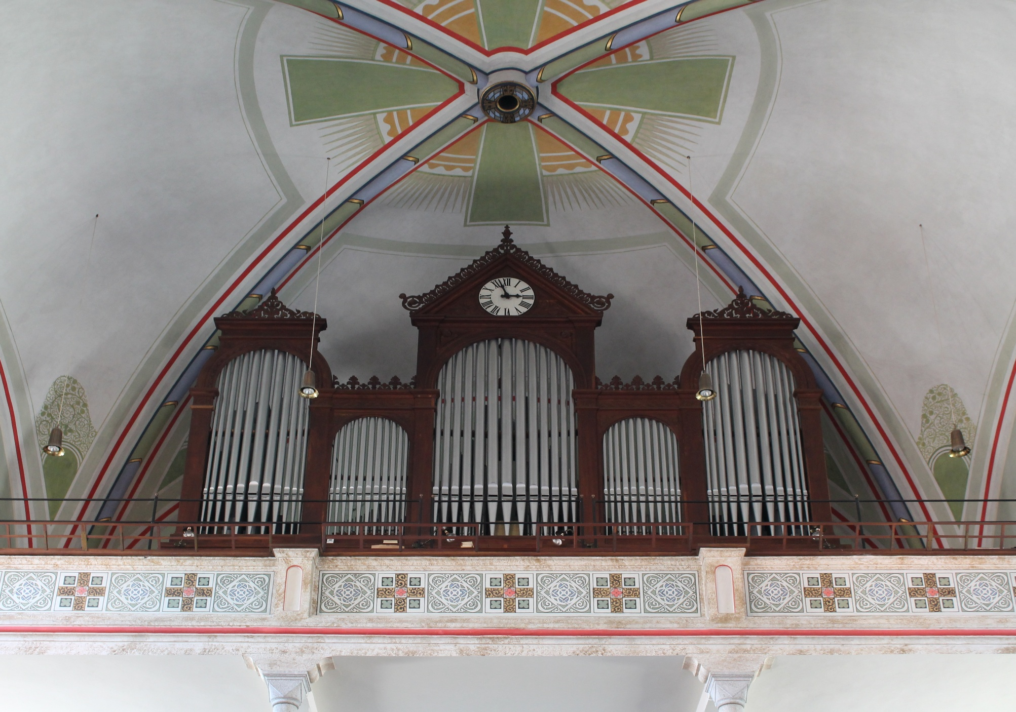 Orgel von Mariä Himmelfahrt in Fridolfing (1893, F. B. Maerz op. 281, II/25)